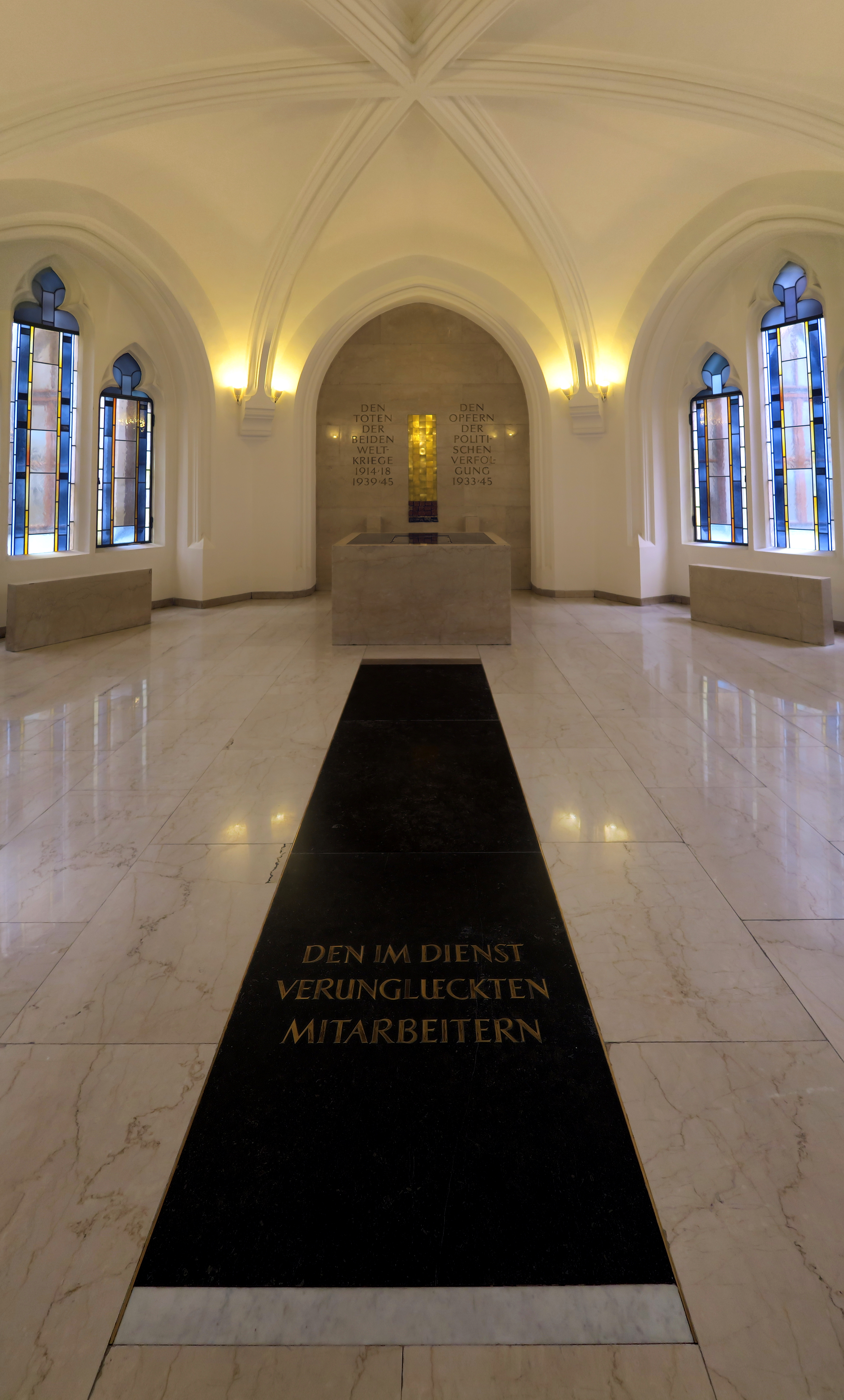 Deutschland, Bayern, München, Neues Rathaus am Marienplatz, Gedenkraum für die Toten beider Weltkriege, die Opfer der politischen Verfolgung von 1933-1945 sowie der "im Dienst verunglückten Mitarbeiter" der Stadt München